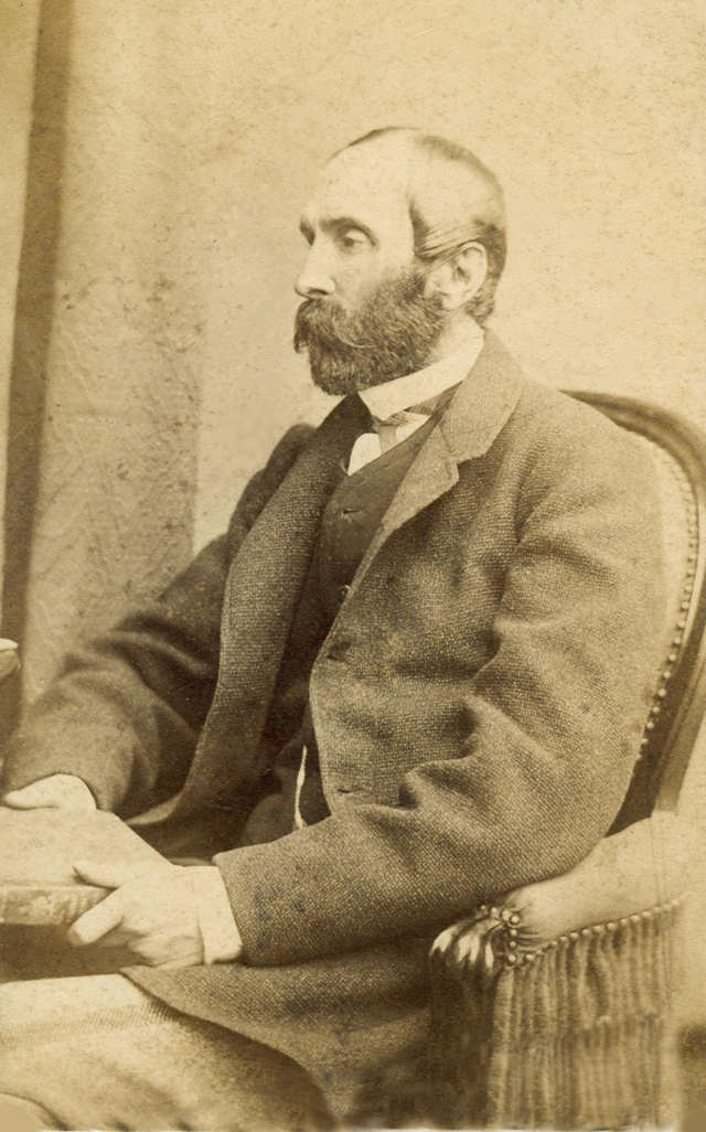 Karol Moszczański, lekarz, chirurg, balneolog,działacz niepodległościowy